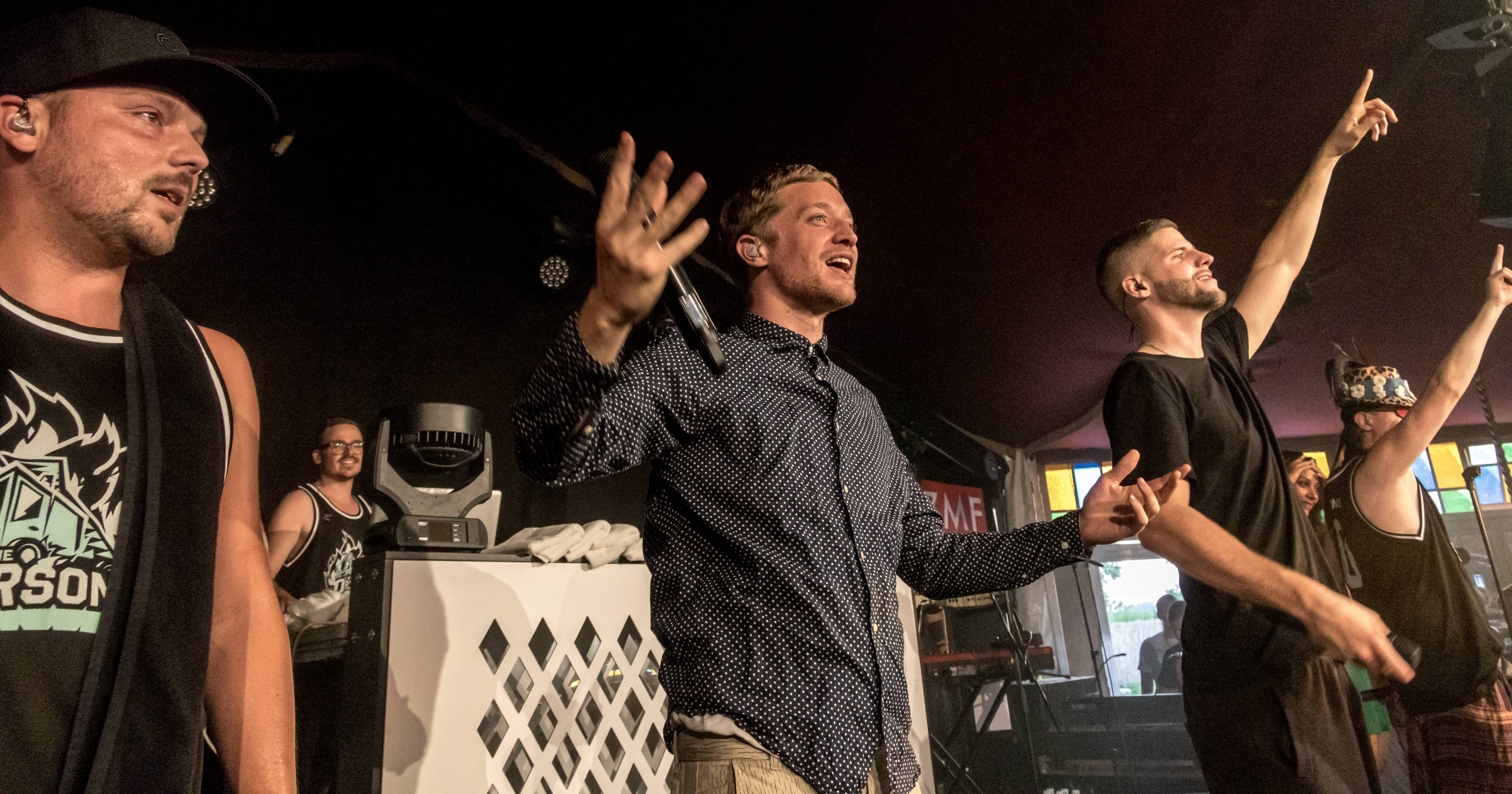 Bilder vom ZMF 2015 Die Hip Hop Band "Die Orsons"